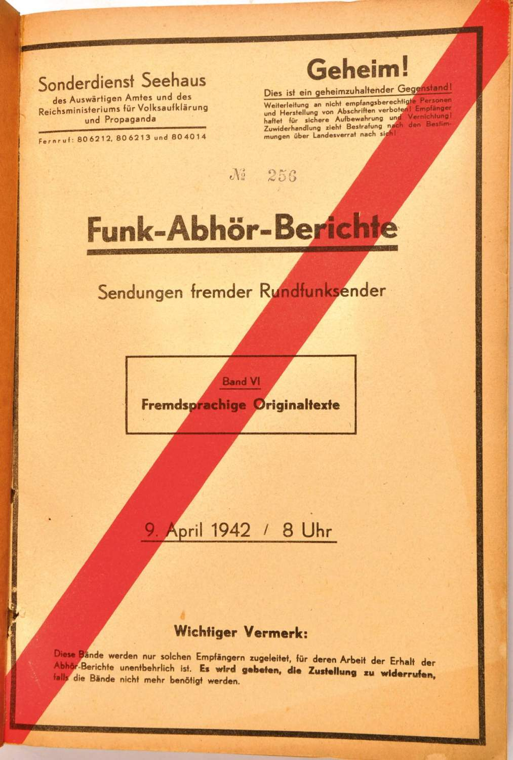 Funk-Abhör-Bericht Nr. 256 vom Sonderdienst Seehaus